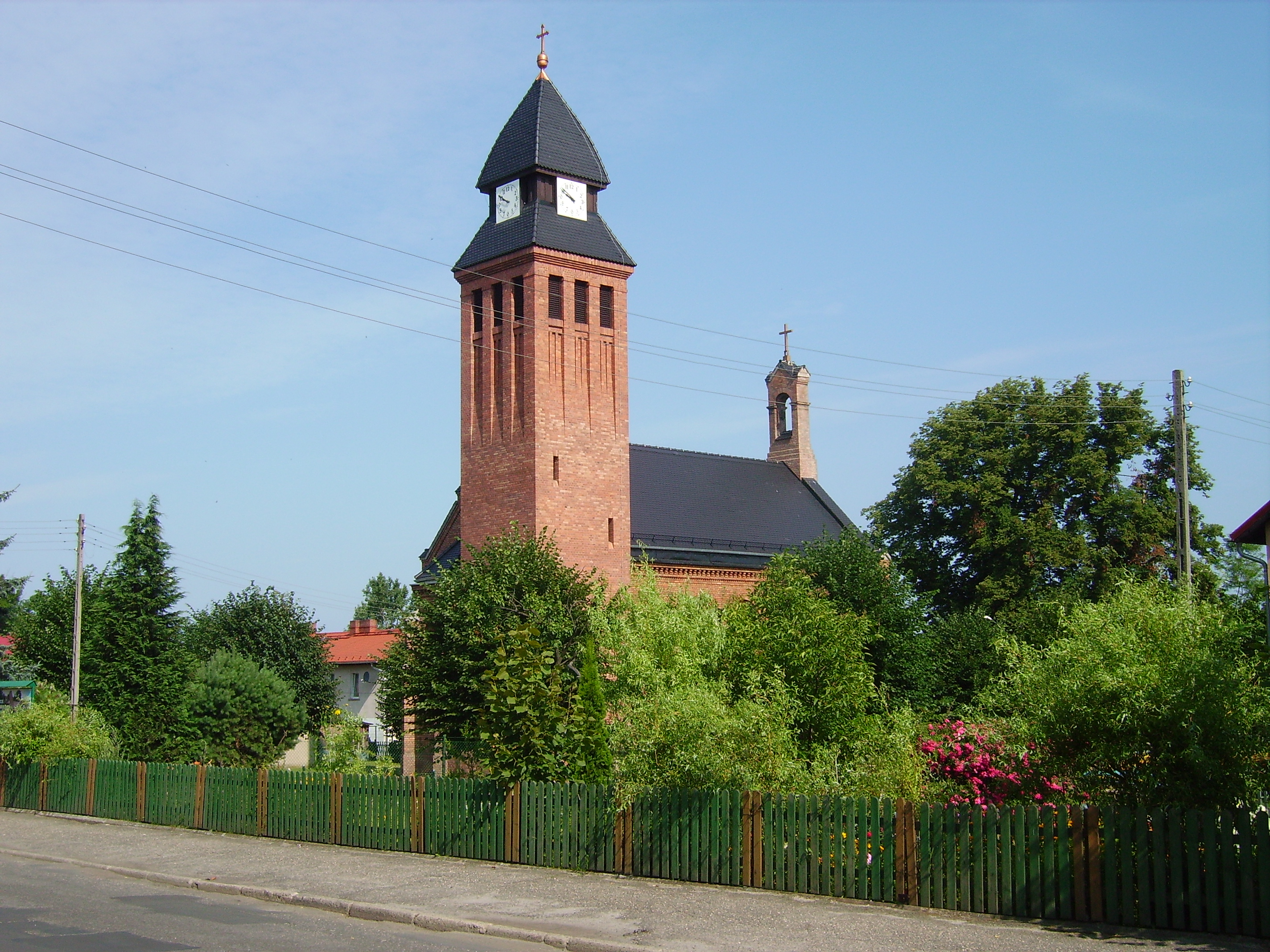 Kościół Matki Bożej Królowej Polski w Węlińcu.